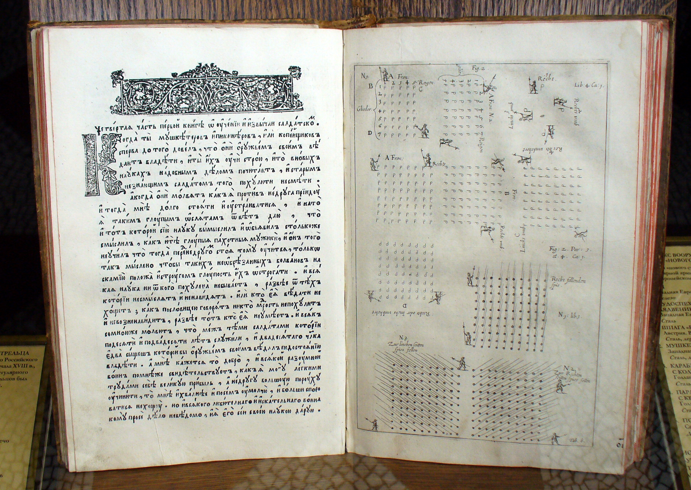 Иоганн Якоби фон Вальхаузен. Учение и хитрость ратного строения пехотных людей. Москва, 1647. Резчик гравюр - Иоганн Теодор де Бри. Титульный лист - Григорий Благушин.